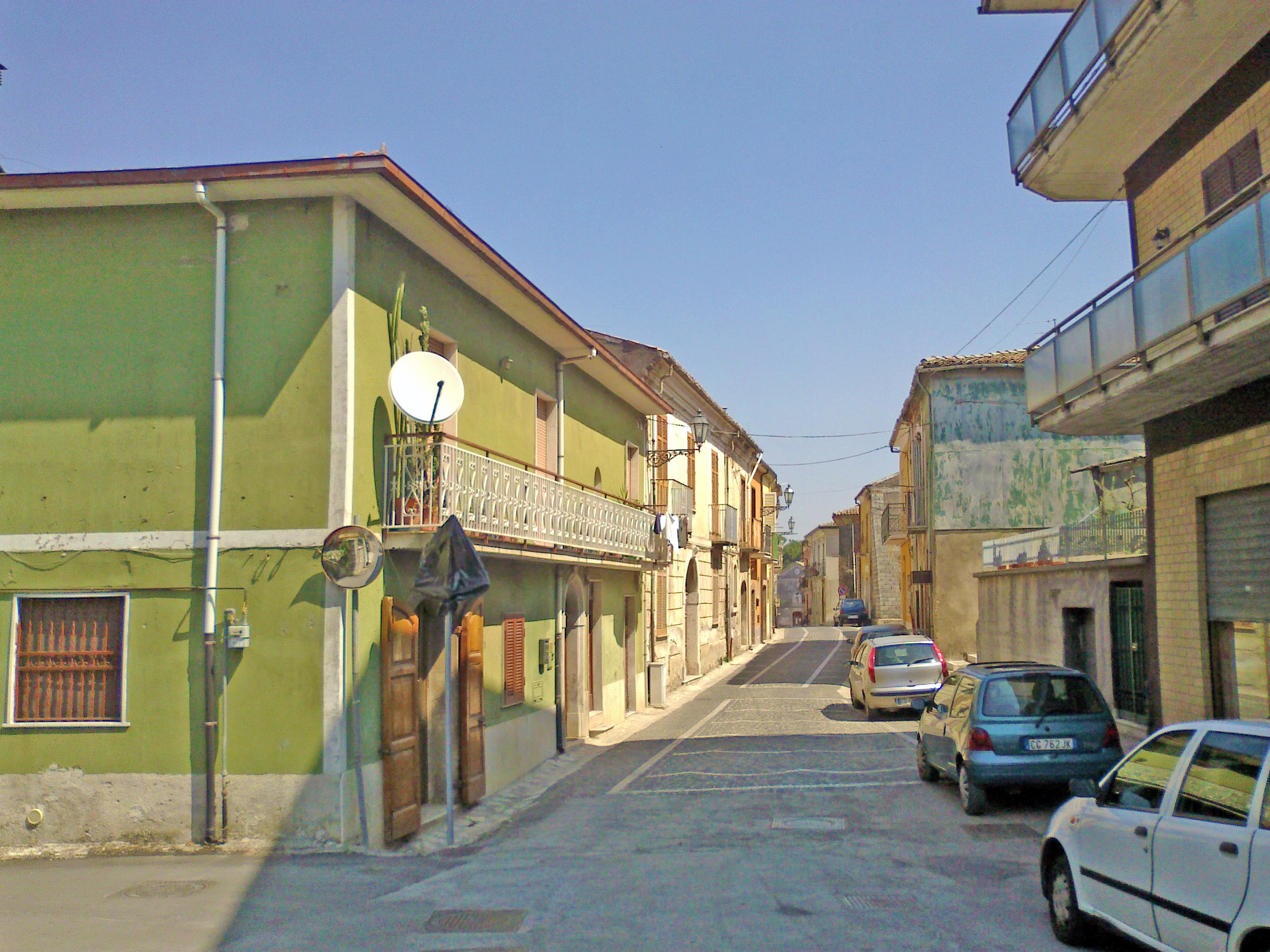 Via Capo Casale, strada principale della frazione di Tavernola San Felice (AV)